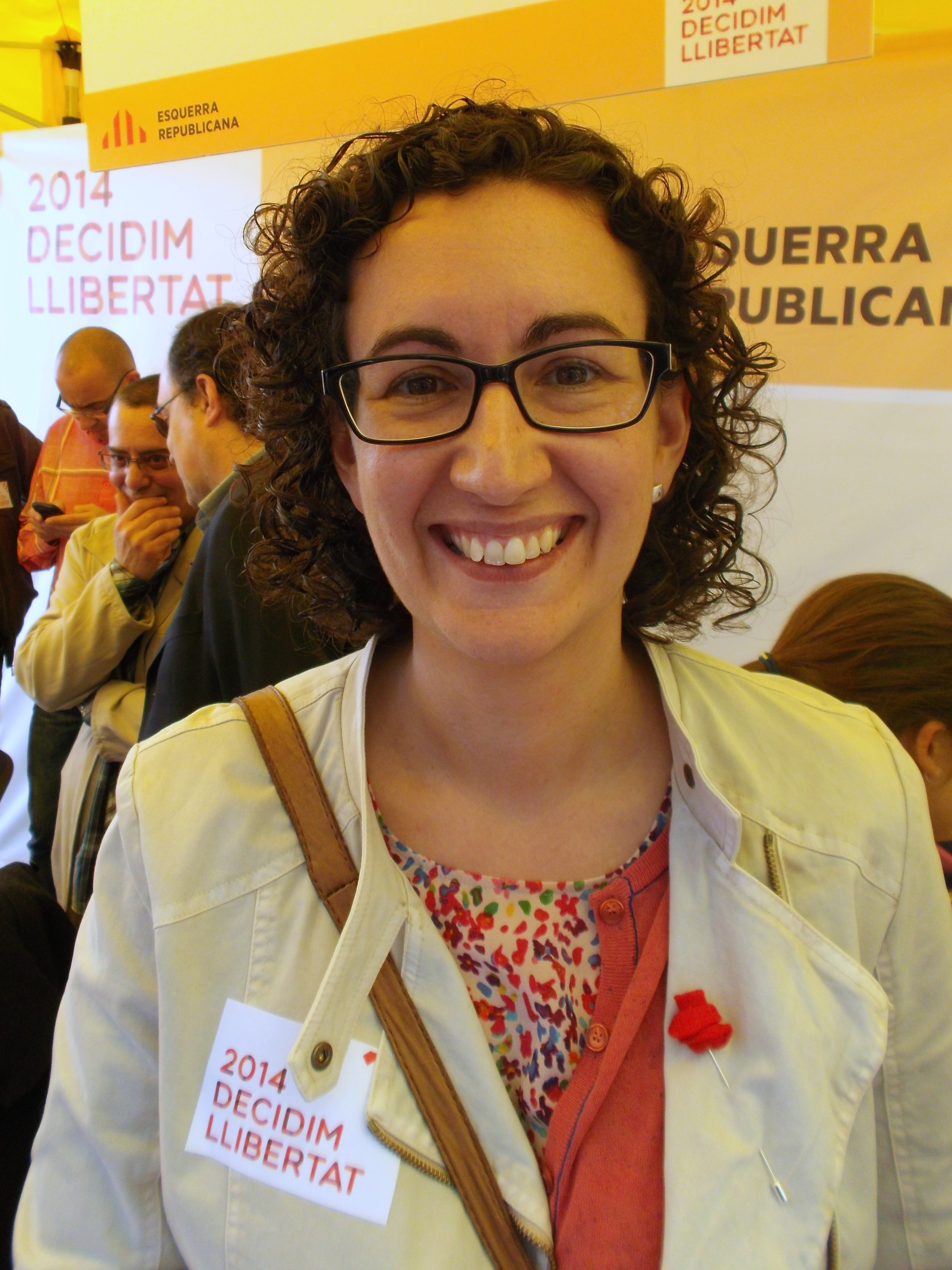 Foto de la Marta Rovira a Barcelona, en la diada de Sant Jordi de 2013